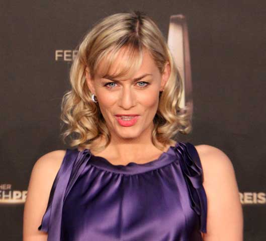 Gesine Cukrowski beim Deutschen Fernsehpreis 2012